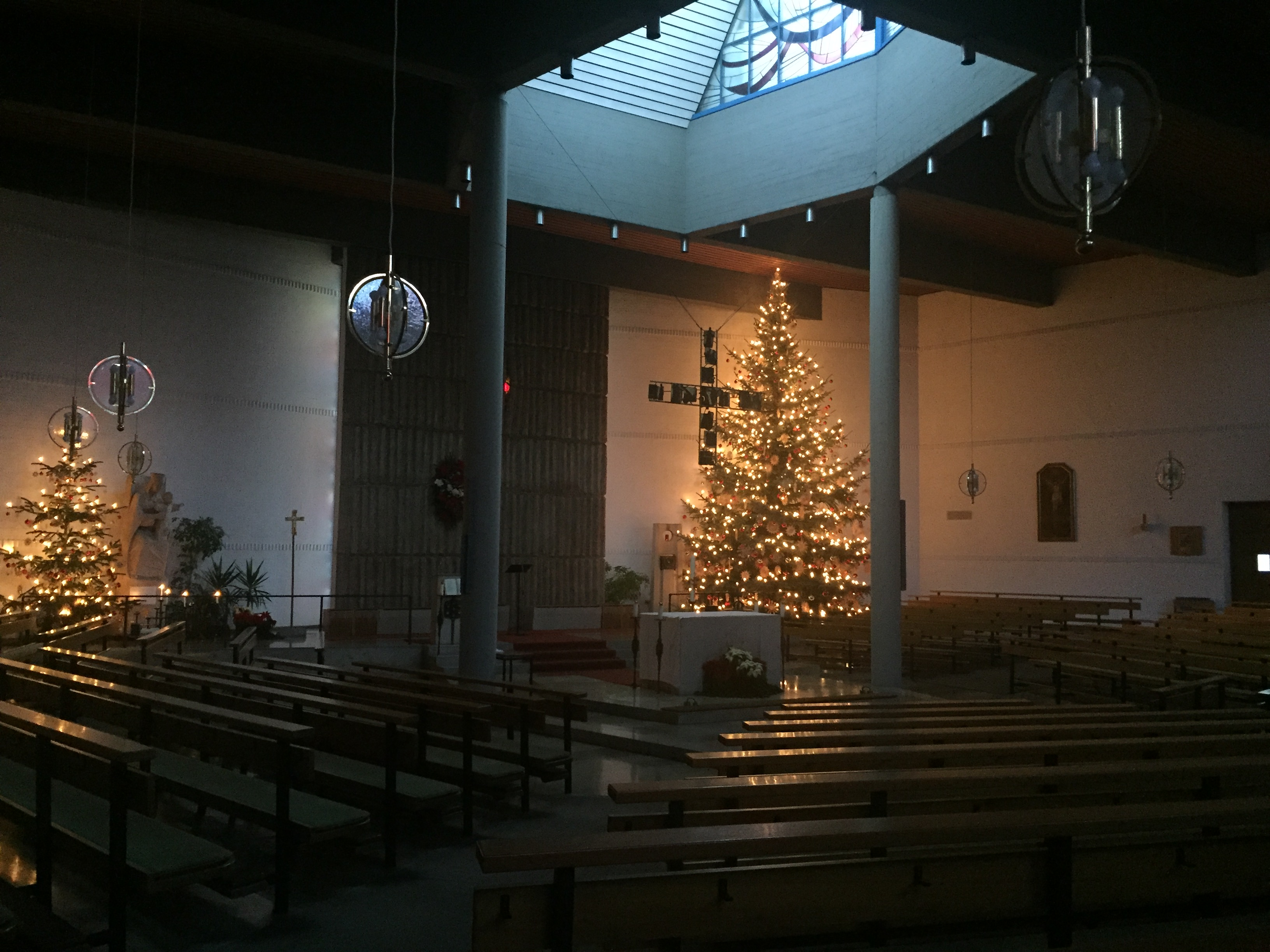 Innenansicht zum Altar